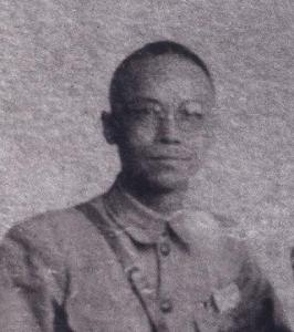 中文（中国大陆）: 这是国民革命军陆军第66军159师副师长罗策群